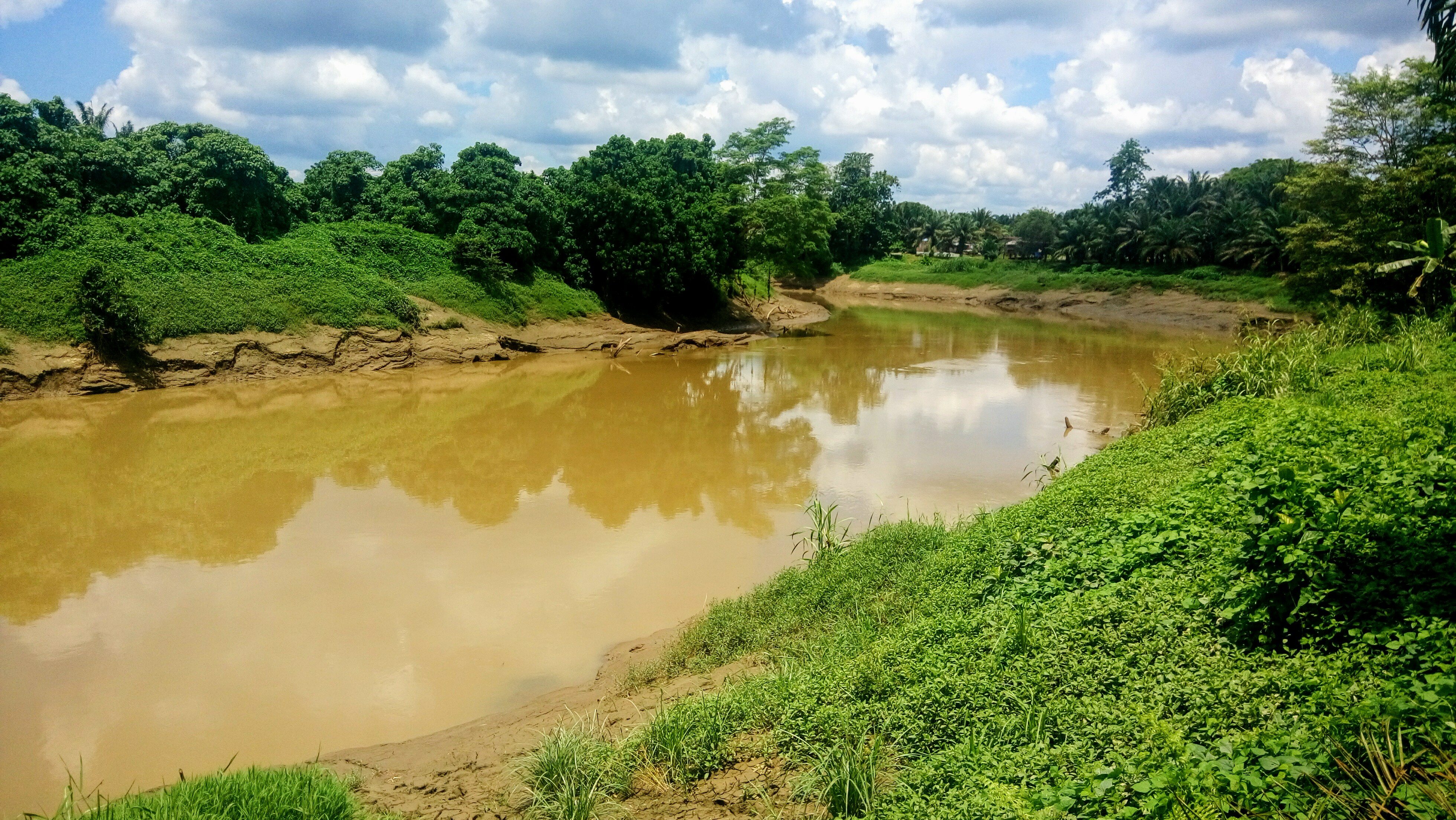 Sungai di Lahad Datu